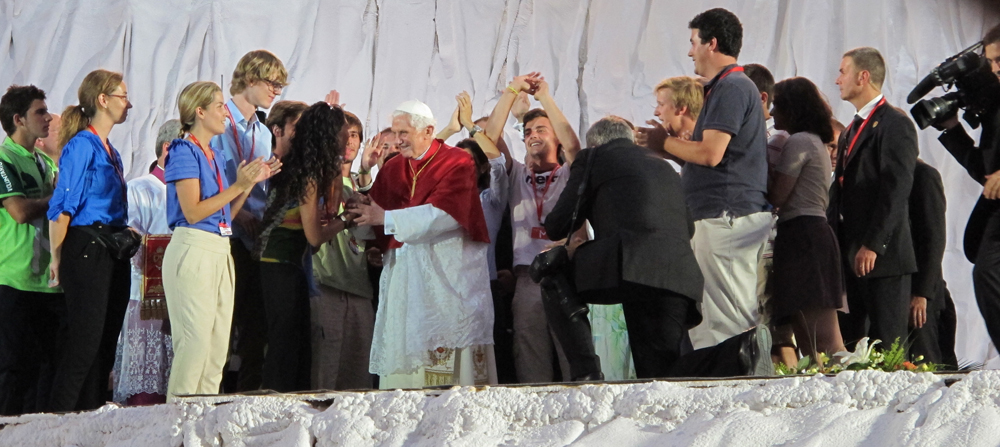 El Papa saluda a jóvenes de distintas nacionalidades a su llegada a la vigilia de Cuatro Vientos el 20/08/2011